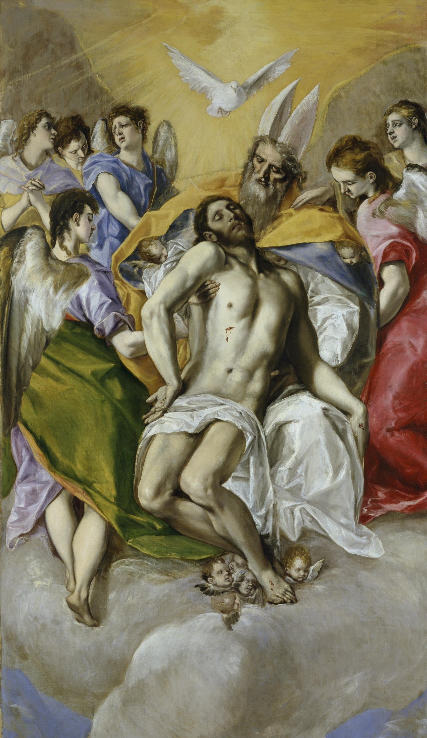 Esta obra, que representa a los tres miembros de la Santísima Trinidad, fue realizada por El Greco con destino al retablo mayor de la iglesia del monasterio de Santo Domingo el Antiguo de Toledo.